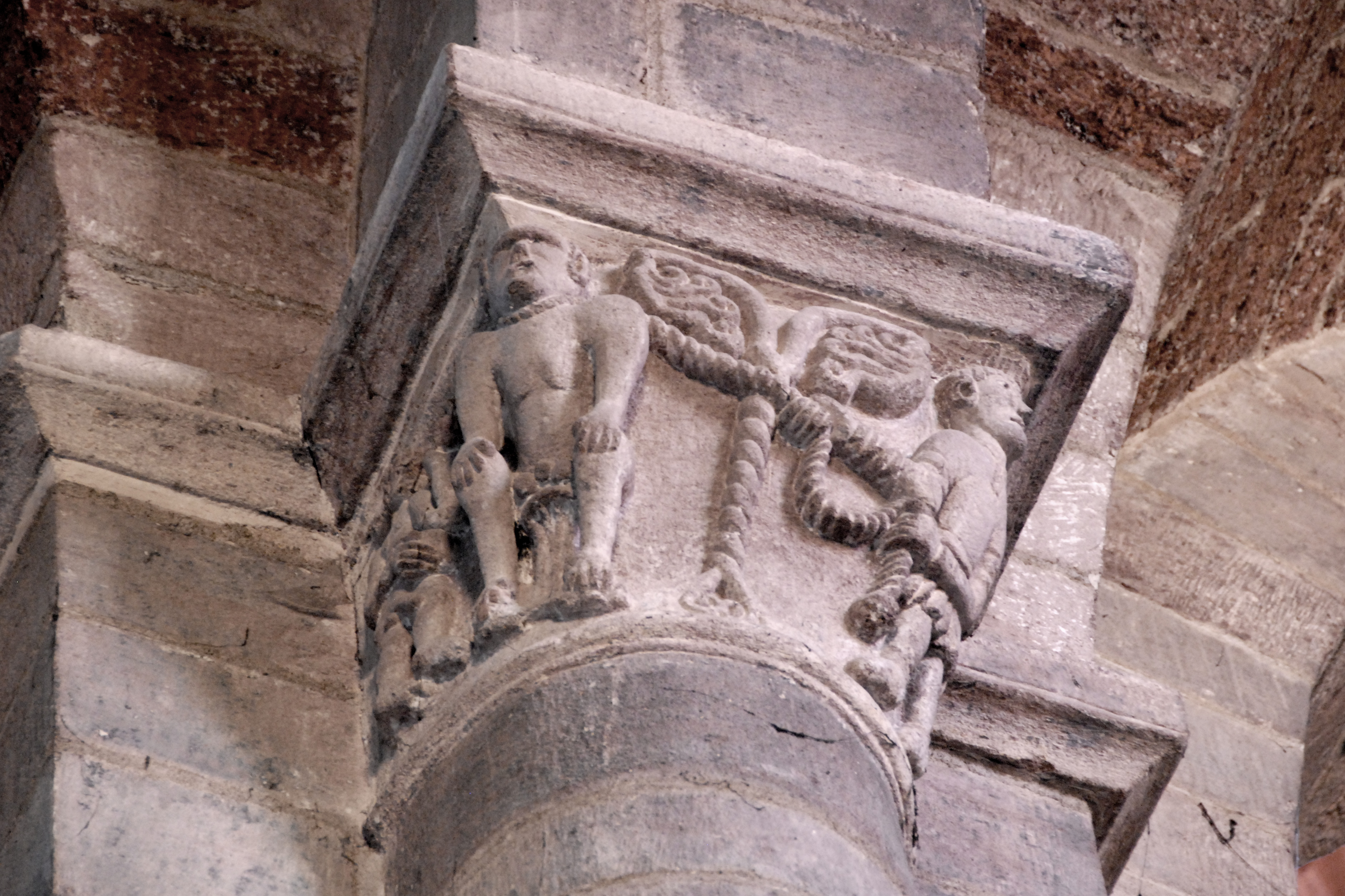 St.-Julien Brioude, Kapitell, Schausteller mit Affen